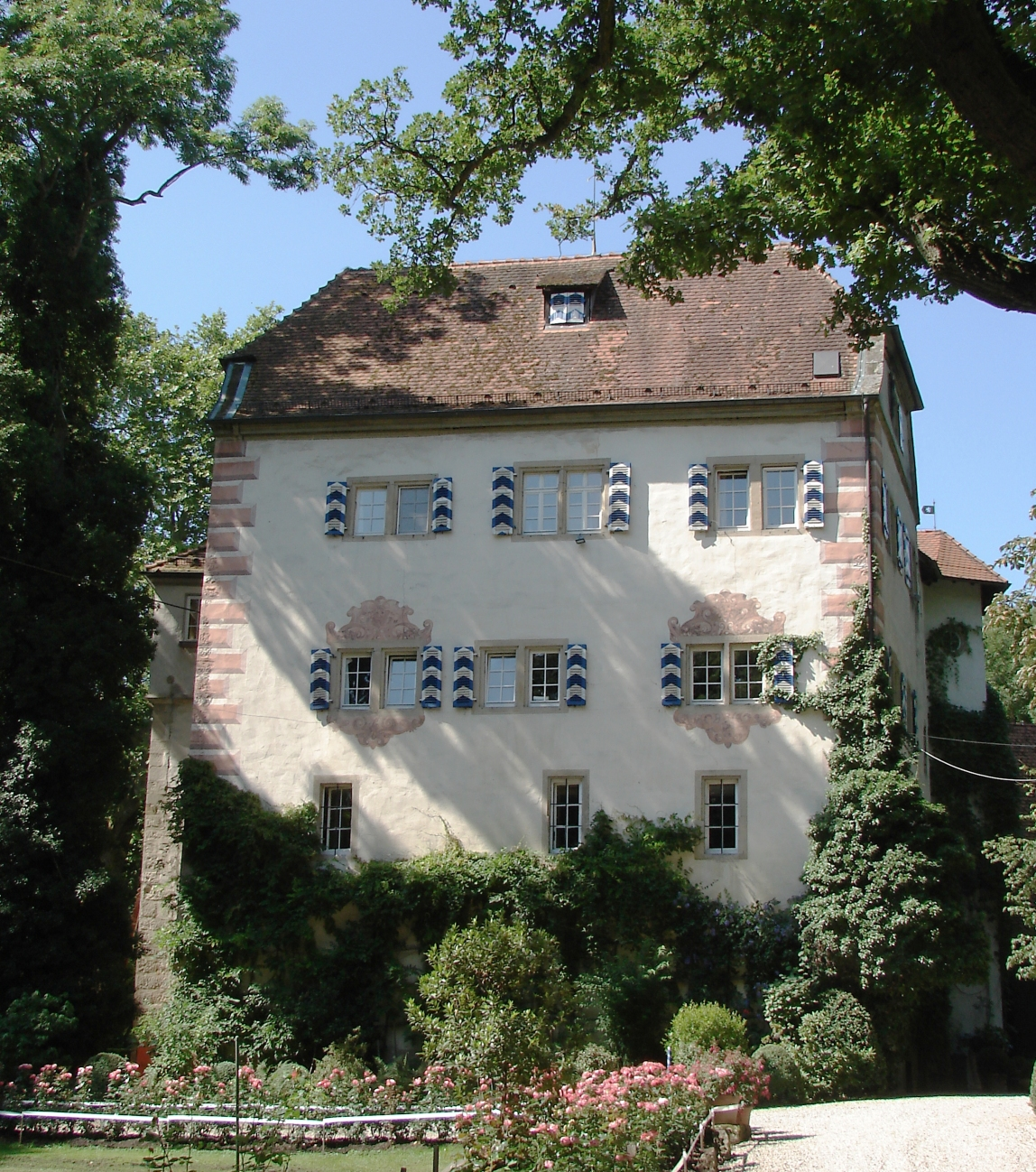 Burg Schaubeck, oberhalb von Steinheim an der Murr